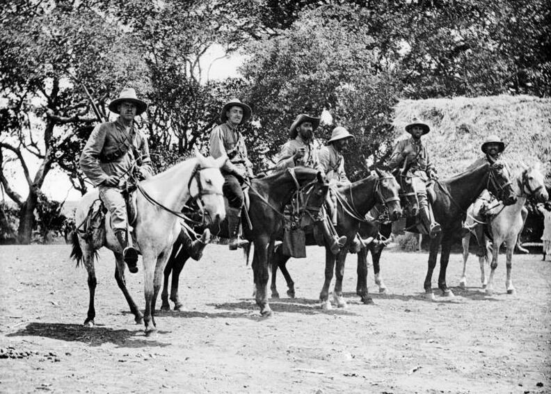 Reiter zu Pferd